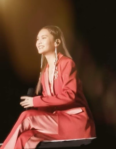 杨丞琳-青春住了谁世界巡回演唱会2019